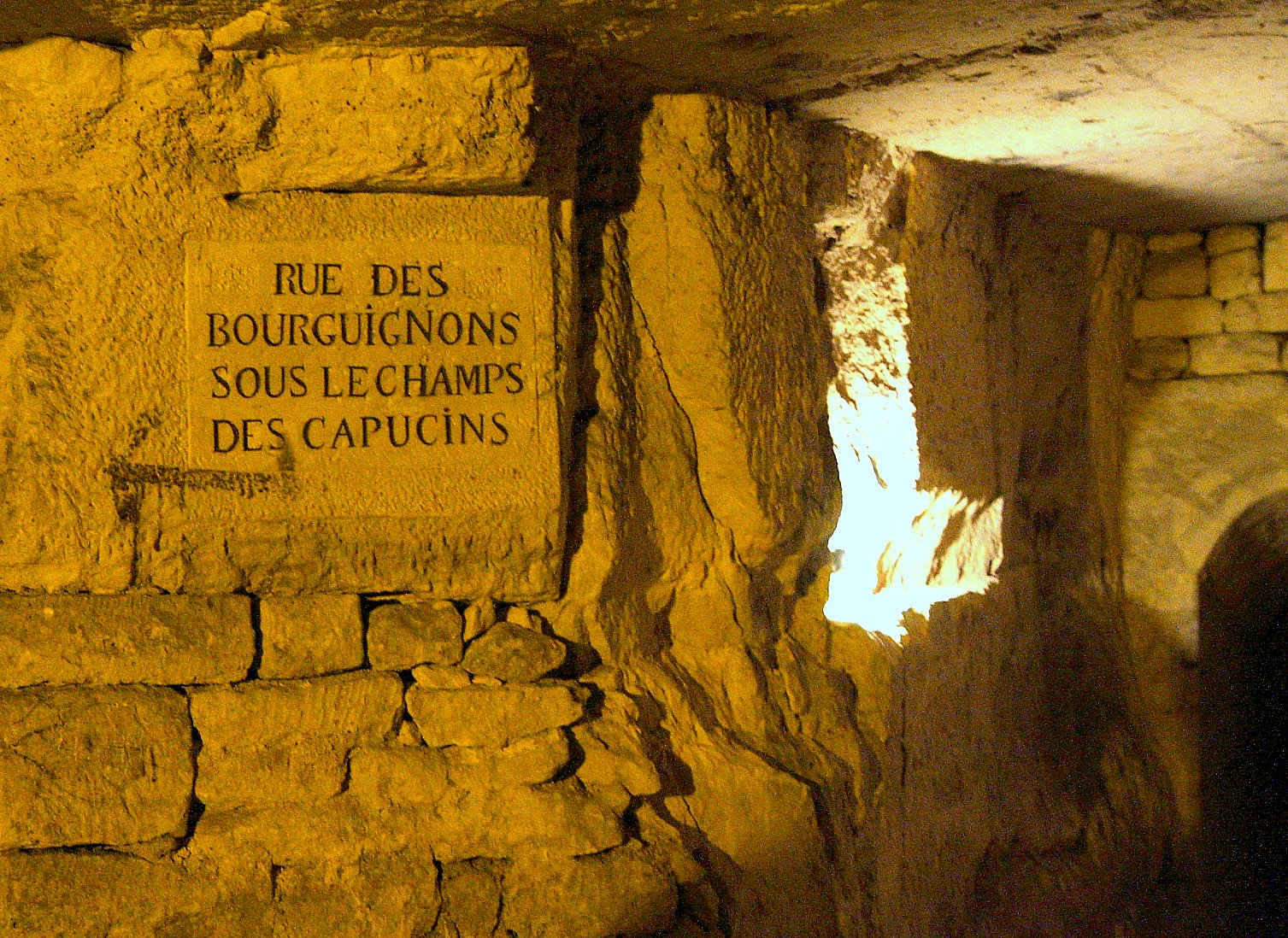 Rue des Bourguignons (Boulevard de Port-Royal). Carrières des Capucins, Paris